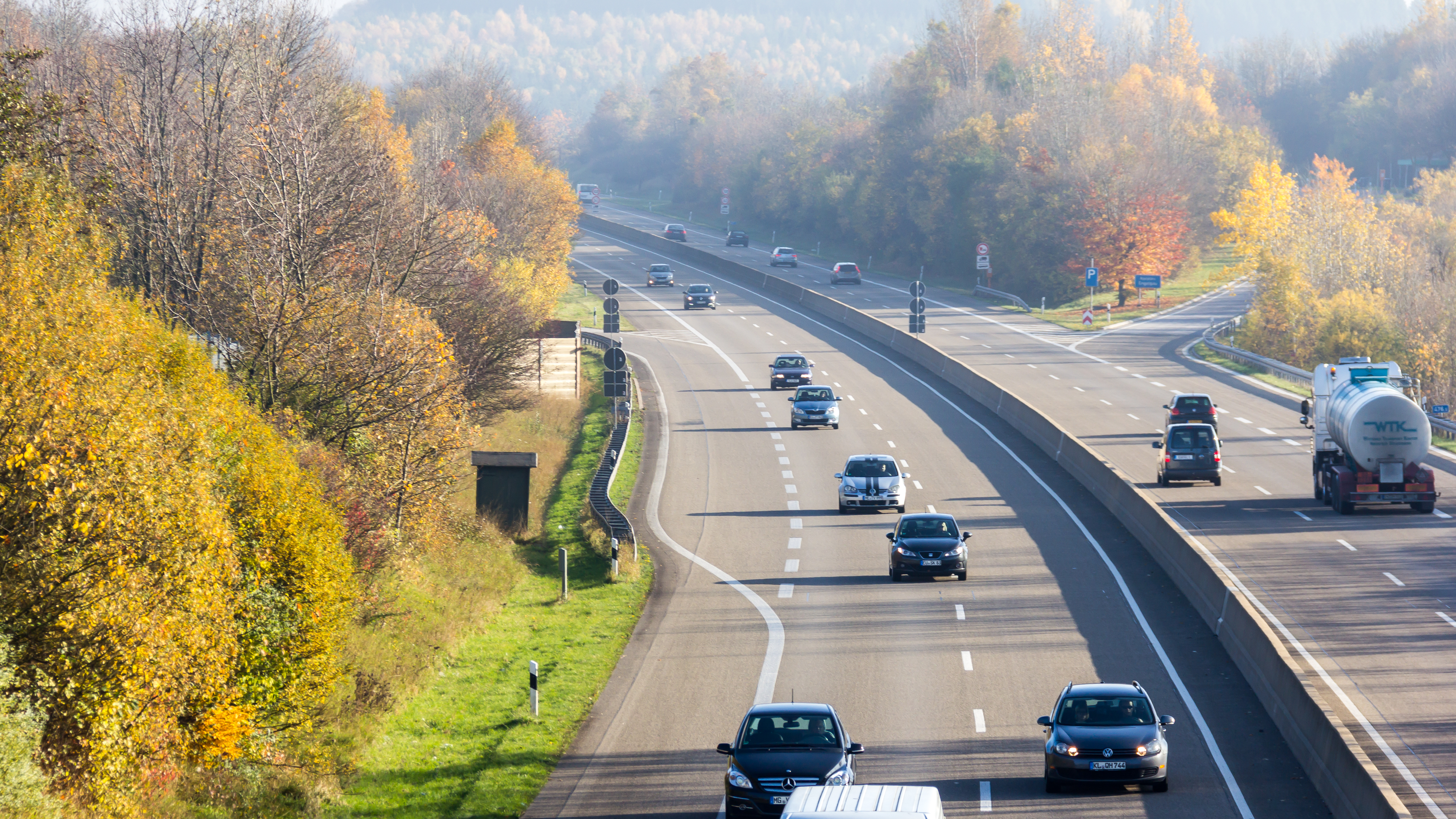 A1 westlich Engelgau, Fahrtrichtung Süden. Rechts oben befindet sich die Einfahrt zum Rastplatz Engelgau